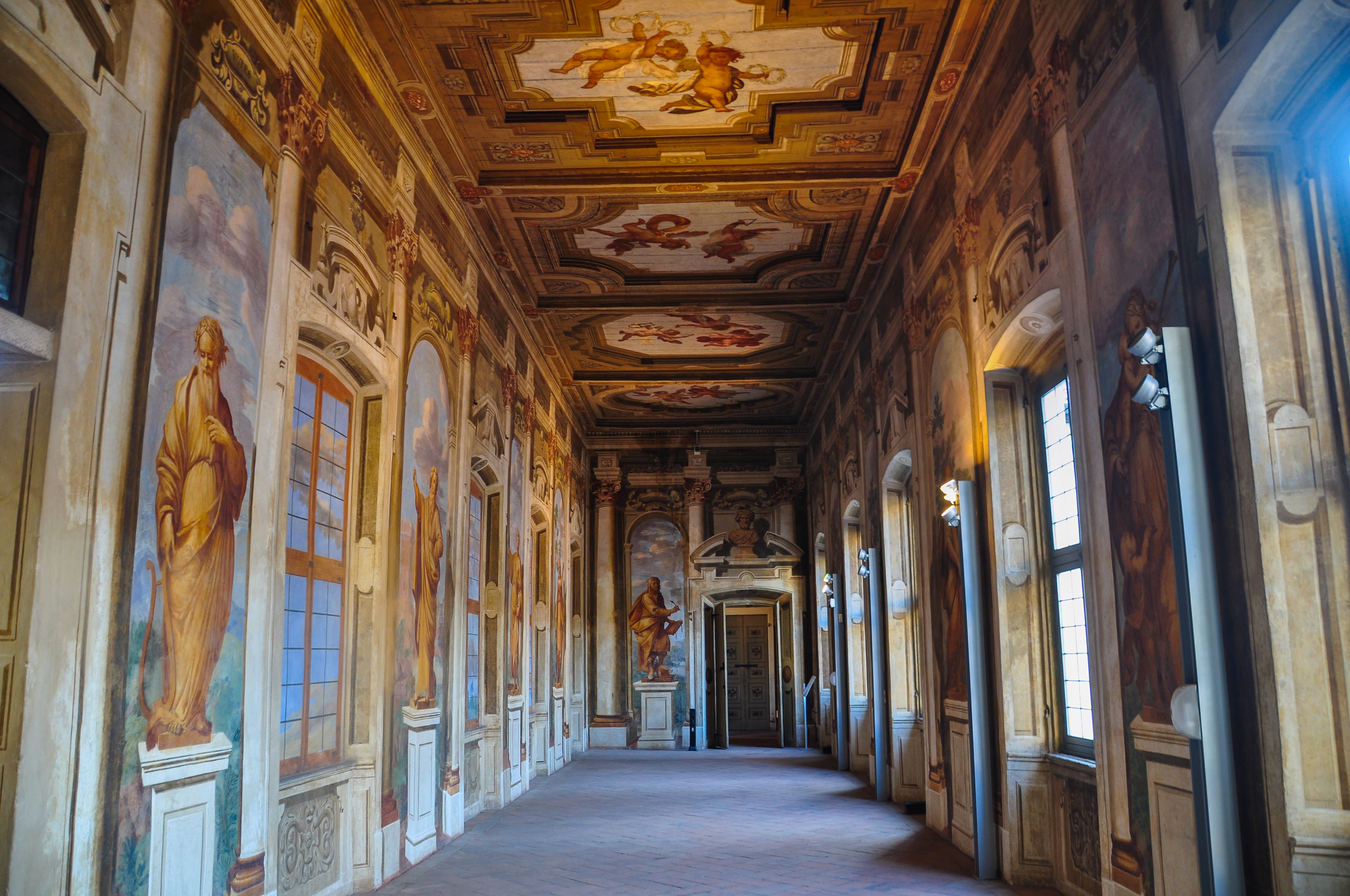 Corridoio delle virtù palazzo borromeo arese